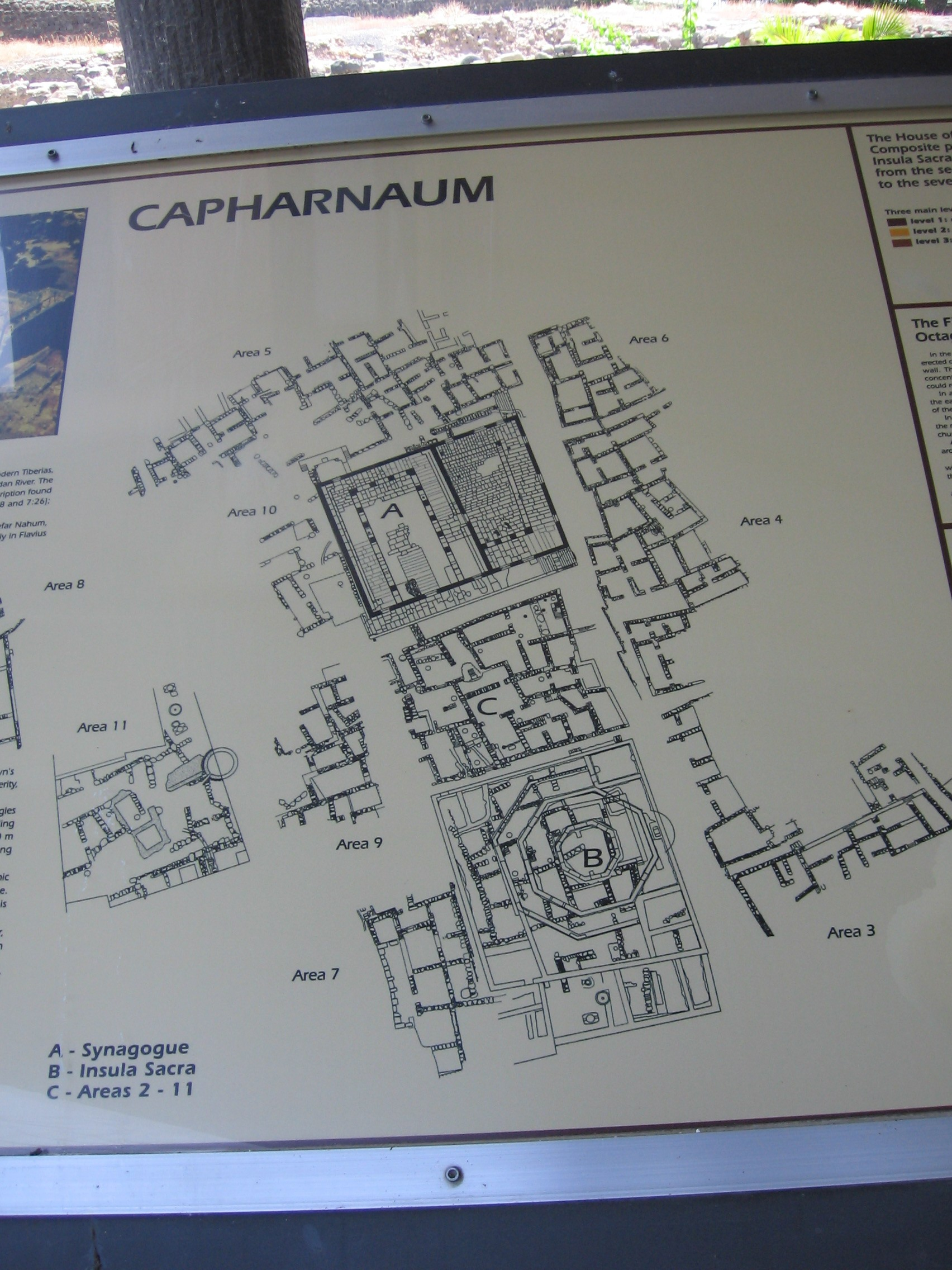 Cafarnao: pianta.